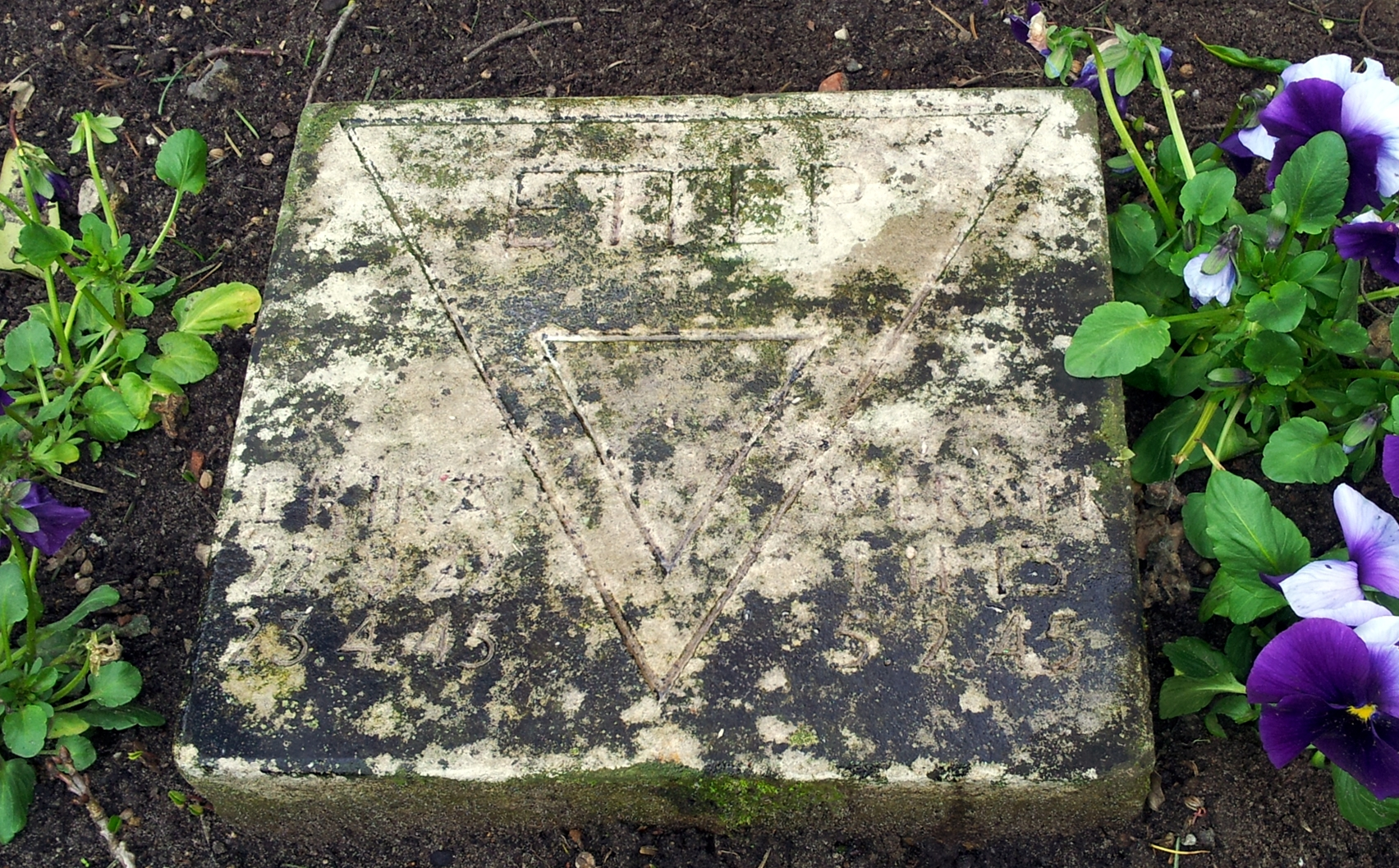 Gedenkstein für Erika Etter und Werner Etter im Ehrenhain Hamburgischer Widerstandskämpfer (Friedhofsplan-Quadrat K 5, Bergstraße gegenüber dem Museum), Friedhof Ohlsdorf, Hamburg.